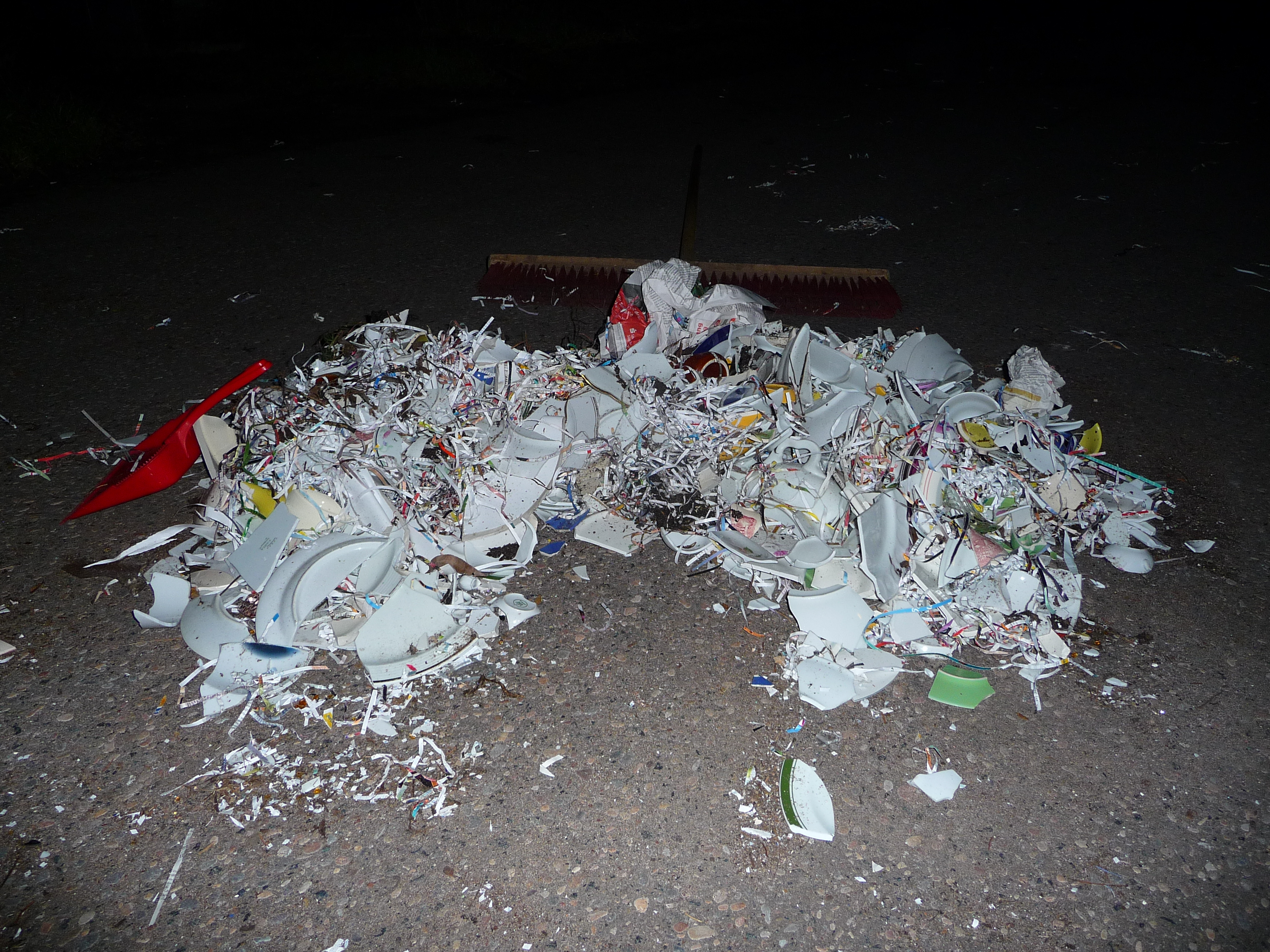 zerbrochenes Geschirr ... am Ende eines Polterabends, fotografiert in Deutschland)